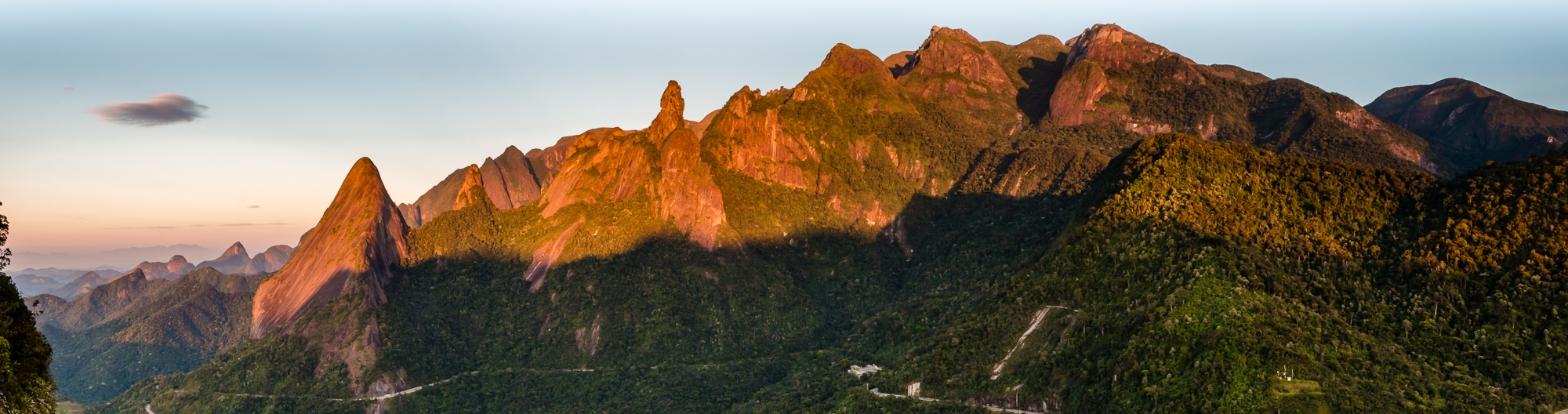 Amanhecer visto do cume do Morro do Elefante, em Teresópolis.